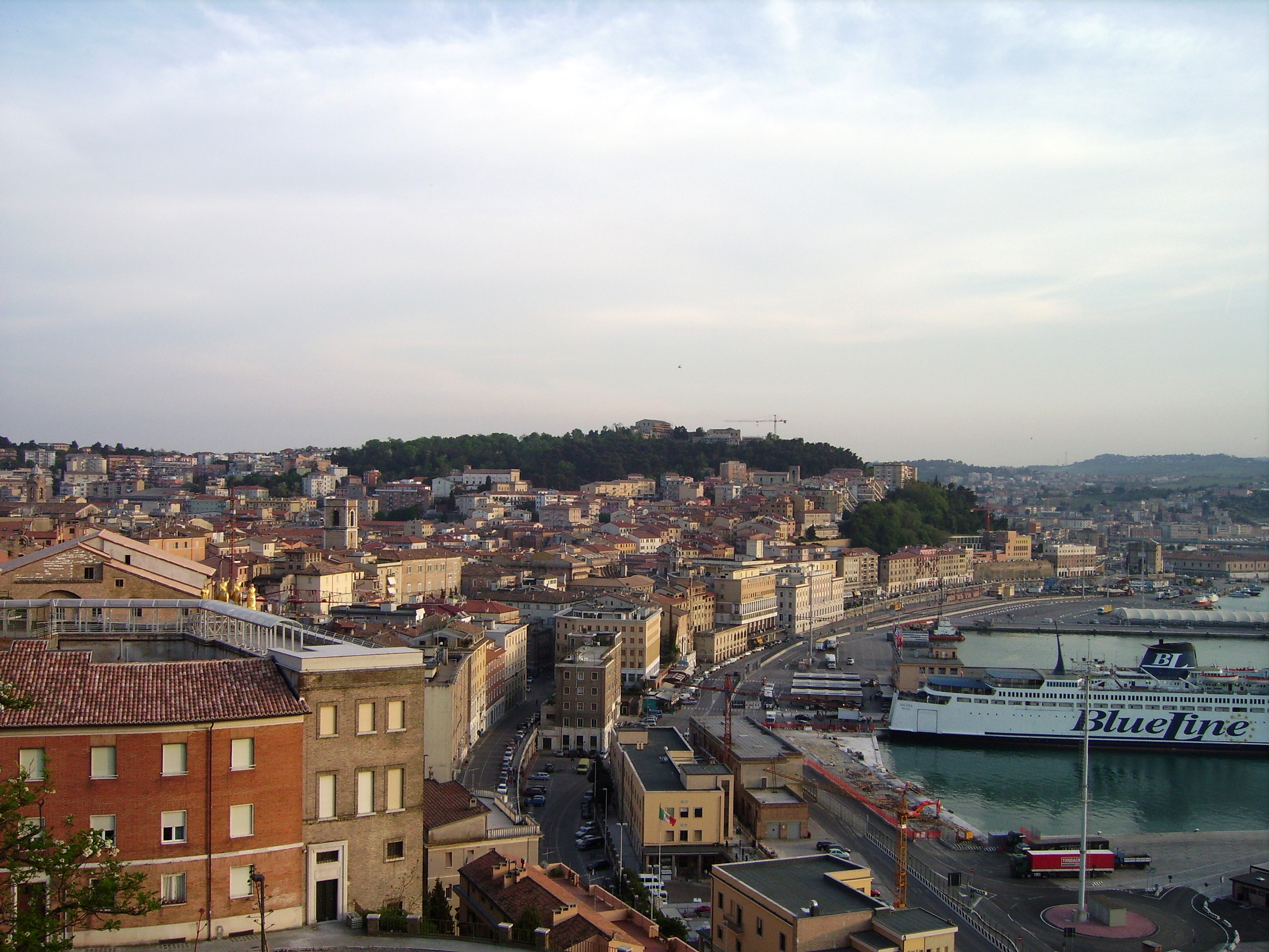 Vista di Ancona dal colle Guasco